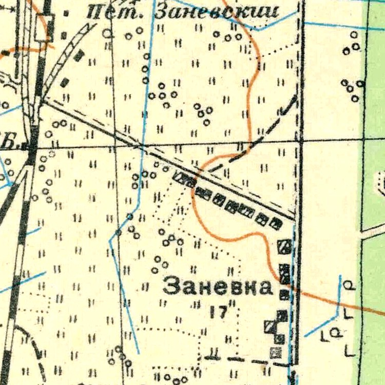 Топографическая карта Ленинградской области, квадрат О-36-2-А-а, деревня Заневка